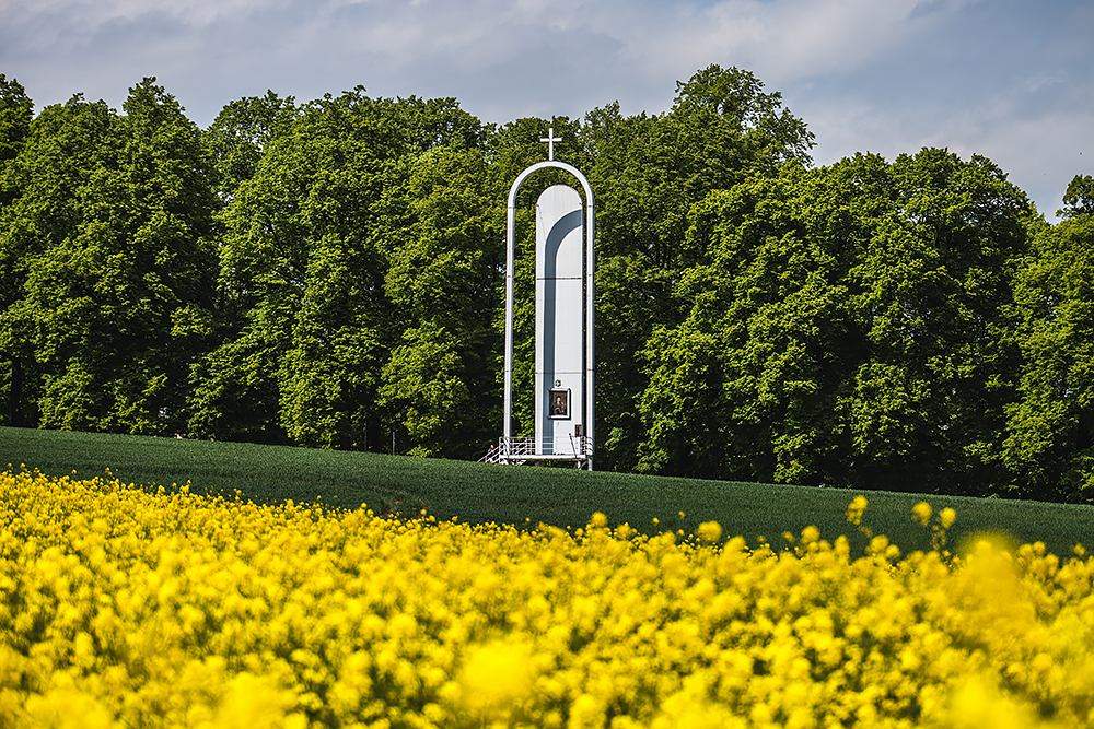 Pozostawiony fragment ołtarza papieskiego, ze znajdującym się na szczycie krzyżem. Symbol wizyty papieża Jana Pawła II w 21 czerwca 1983 r. na Górze Św. Anny.